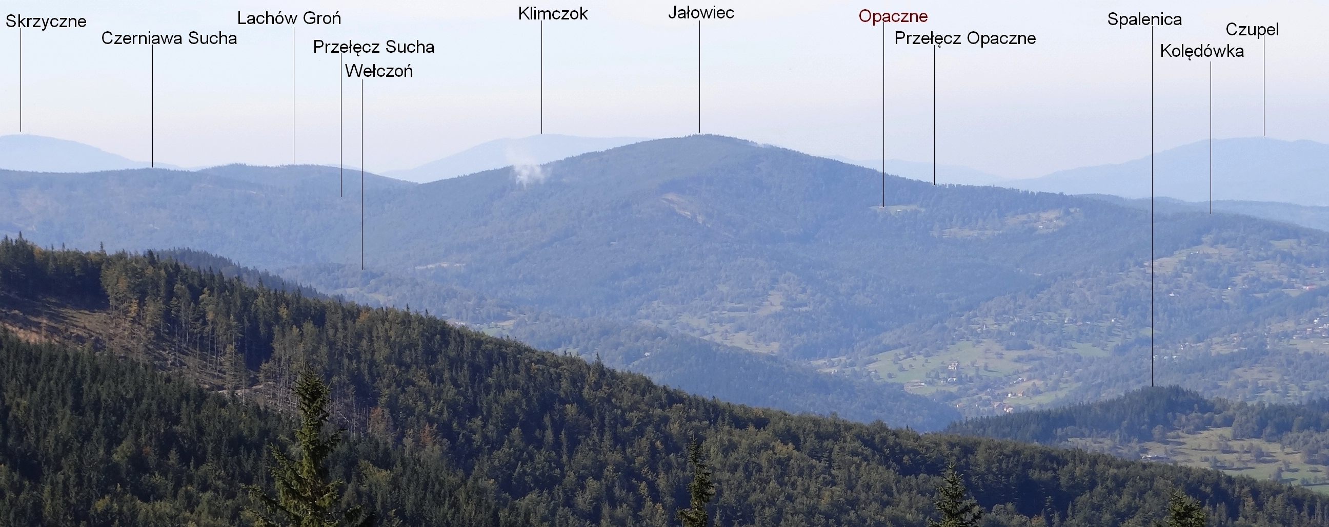 Widok z Hali Kucałowej